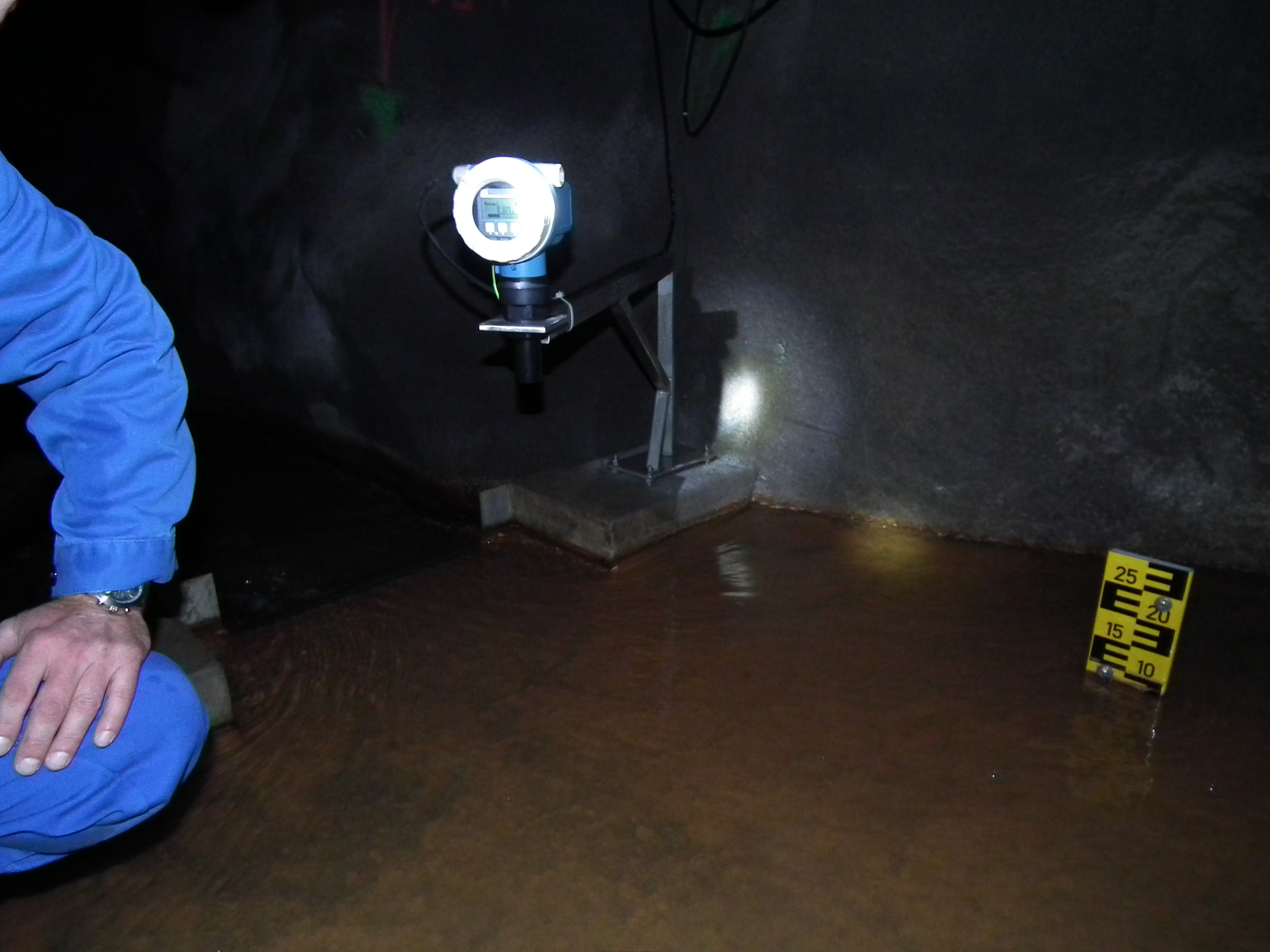 Meßstelle der Abflussmenge (Ultraschall-Pegelmessung) am Ende des Wismut-Stolln, Wassertief ca. 7 cm; Befahrung Wismut-Stolln und Tiefer Elbstolln am 17. September 2015